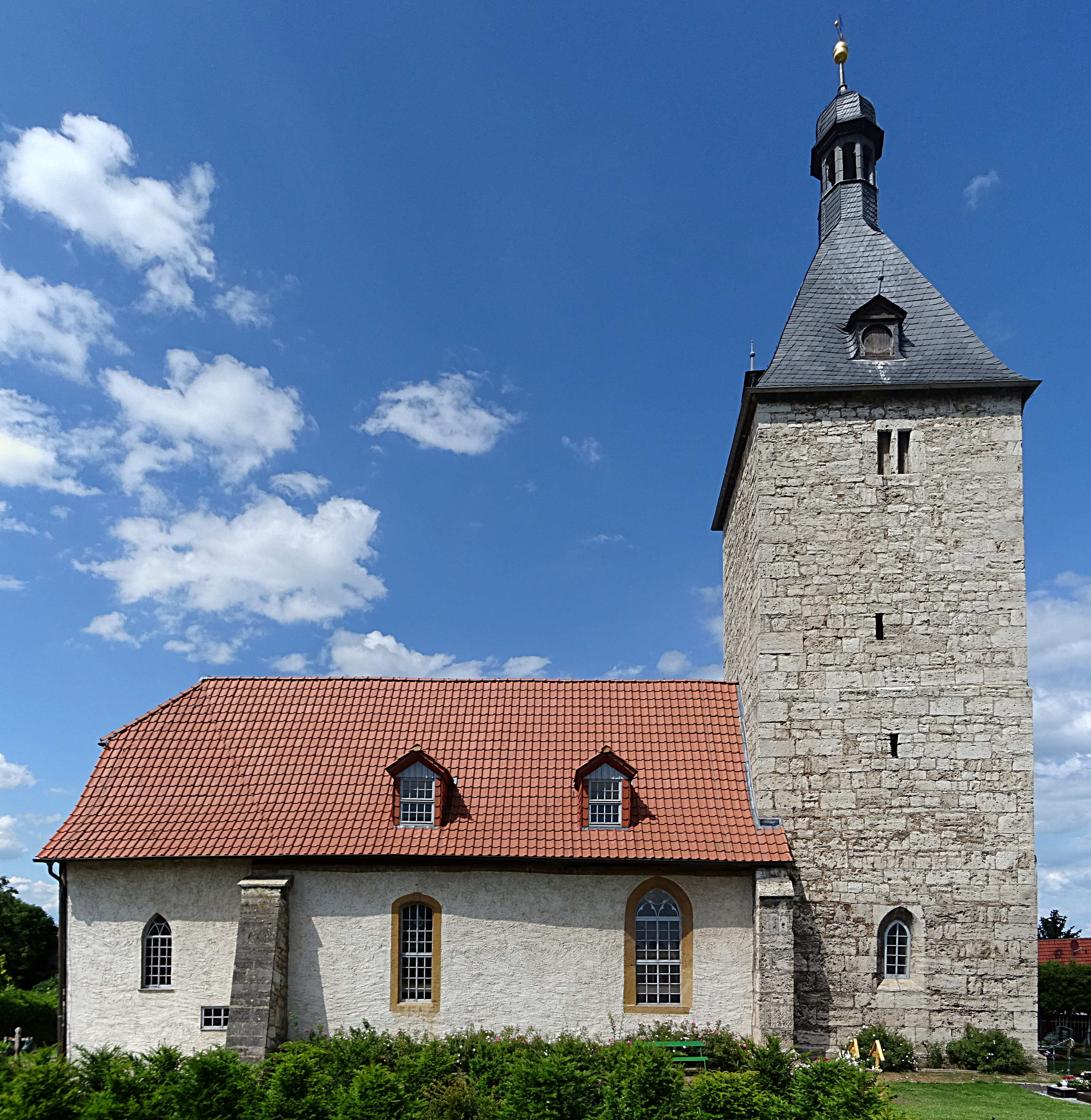 Dorfkirche St. Cyriakus (Höngeda) von Süden